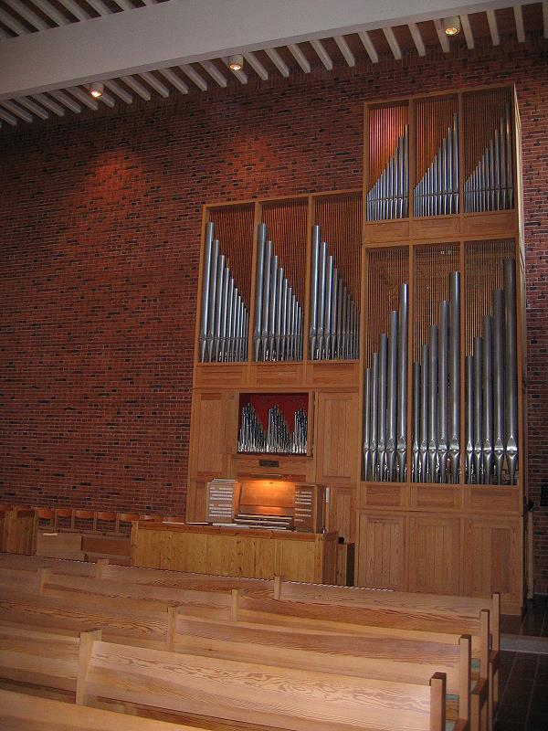 Organ of Abildgaard Kirke